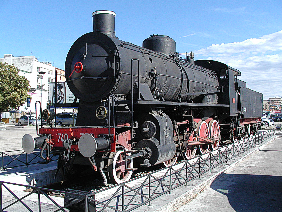 Pescara